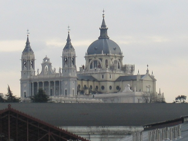 Descripción: Vista de la Catedral de la Almudena desde el parque del Oeste Fotógrafo: Foto tomada por Sanbec